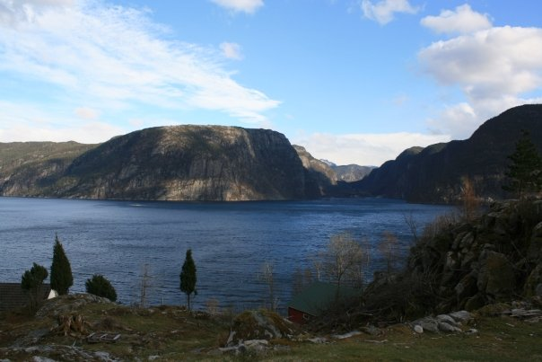 Bilde tatt fra Ytre Eiane, utsikt over Jøsenfjorden mot Tøtlandsvik